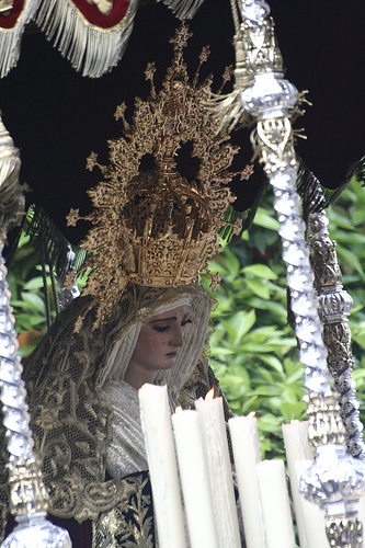 María Santísima del Buen Fin. Semana Santa en Sevilla. Año 2006 Foto realizada y propiedad de Ángel Cachón